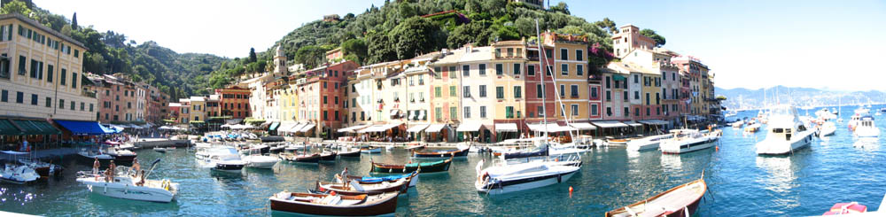 Panoramic view of - vue panoramique de - Portofino Italie